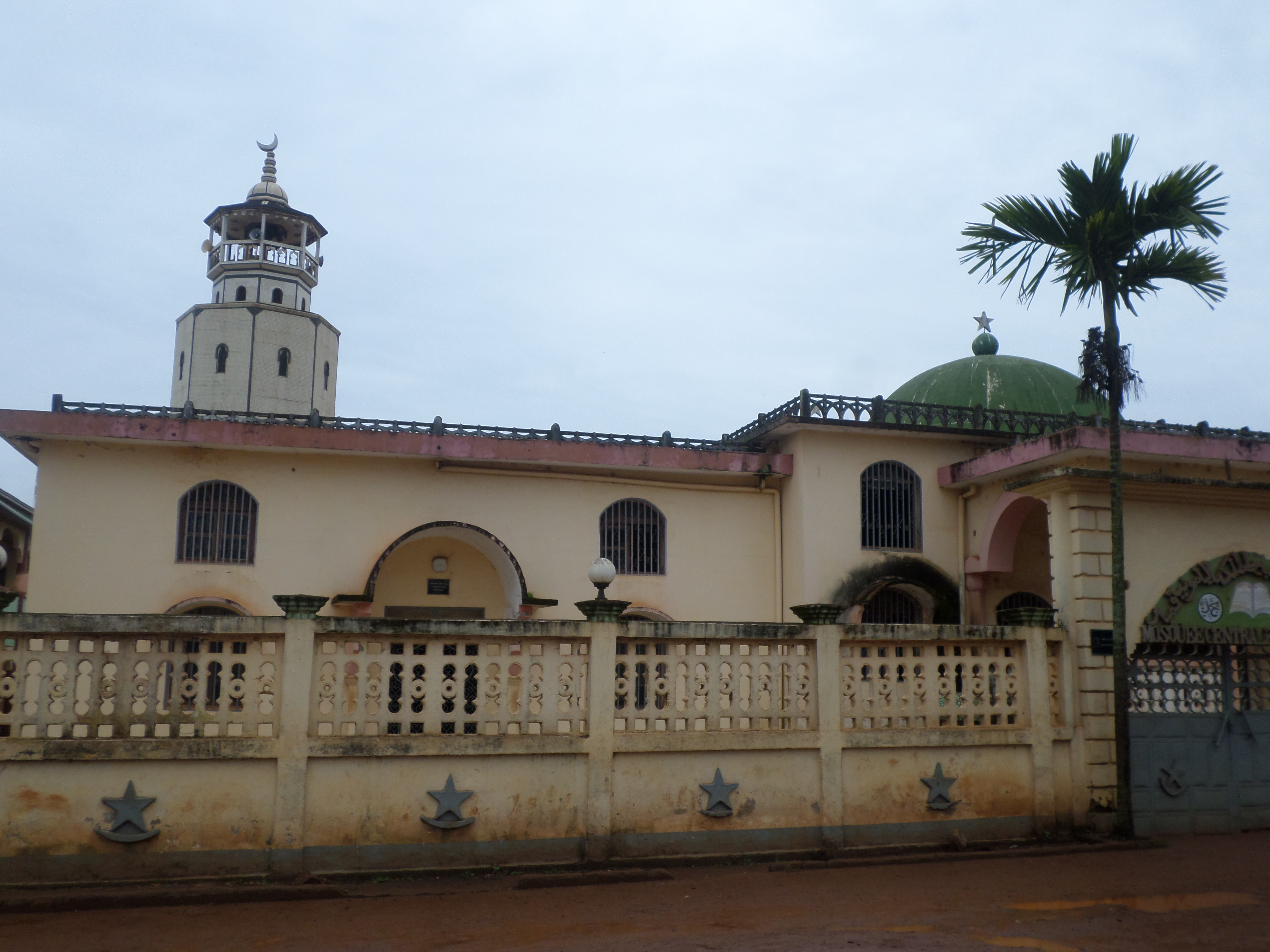 Mosquée centrale de Foumban